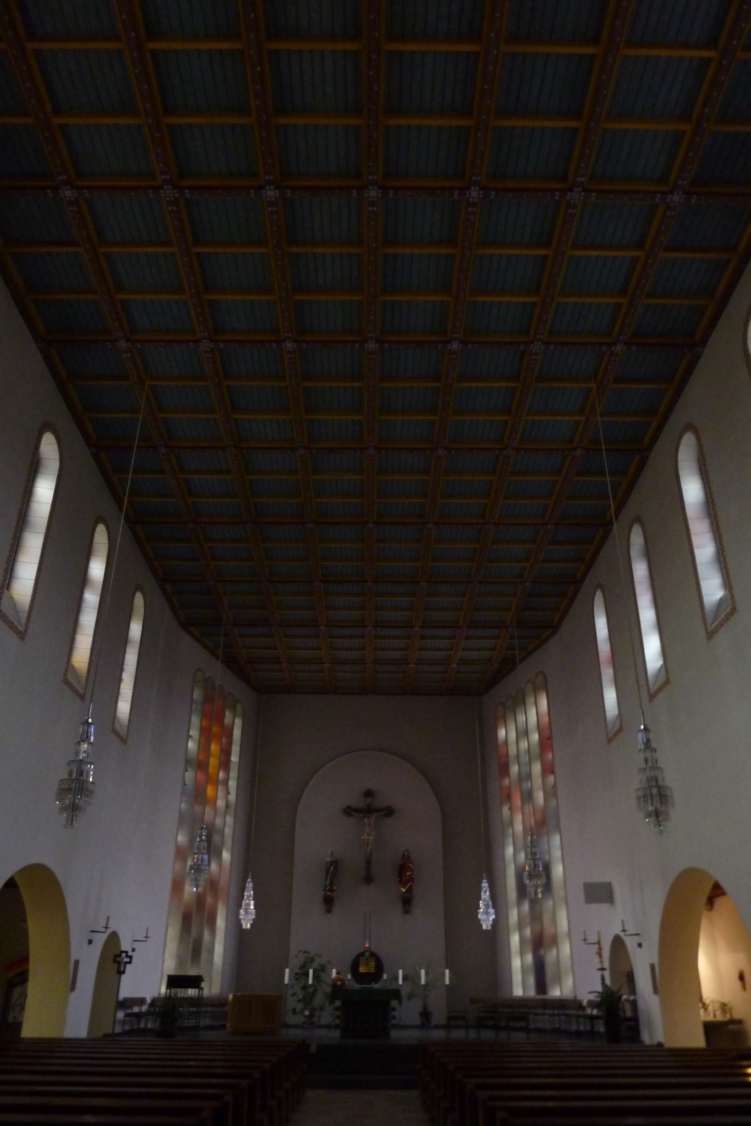 katholische Pfarrkirche St. Martin in Rheinbach, Innenansicht